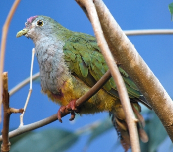 Beautiful Fruit Dove